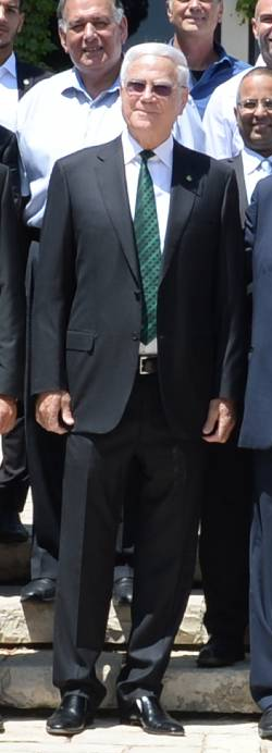 נשיא מדינת ישראל ראובן ריבלין עם שתי הקבוצות המשתתפות במשחק אלוף האלופים, מכבי חיפה והפועל באר שבע.